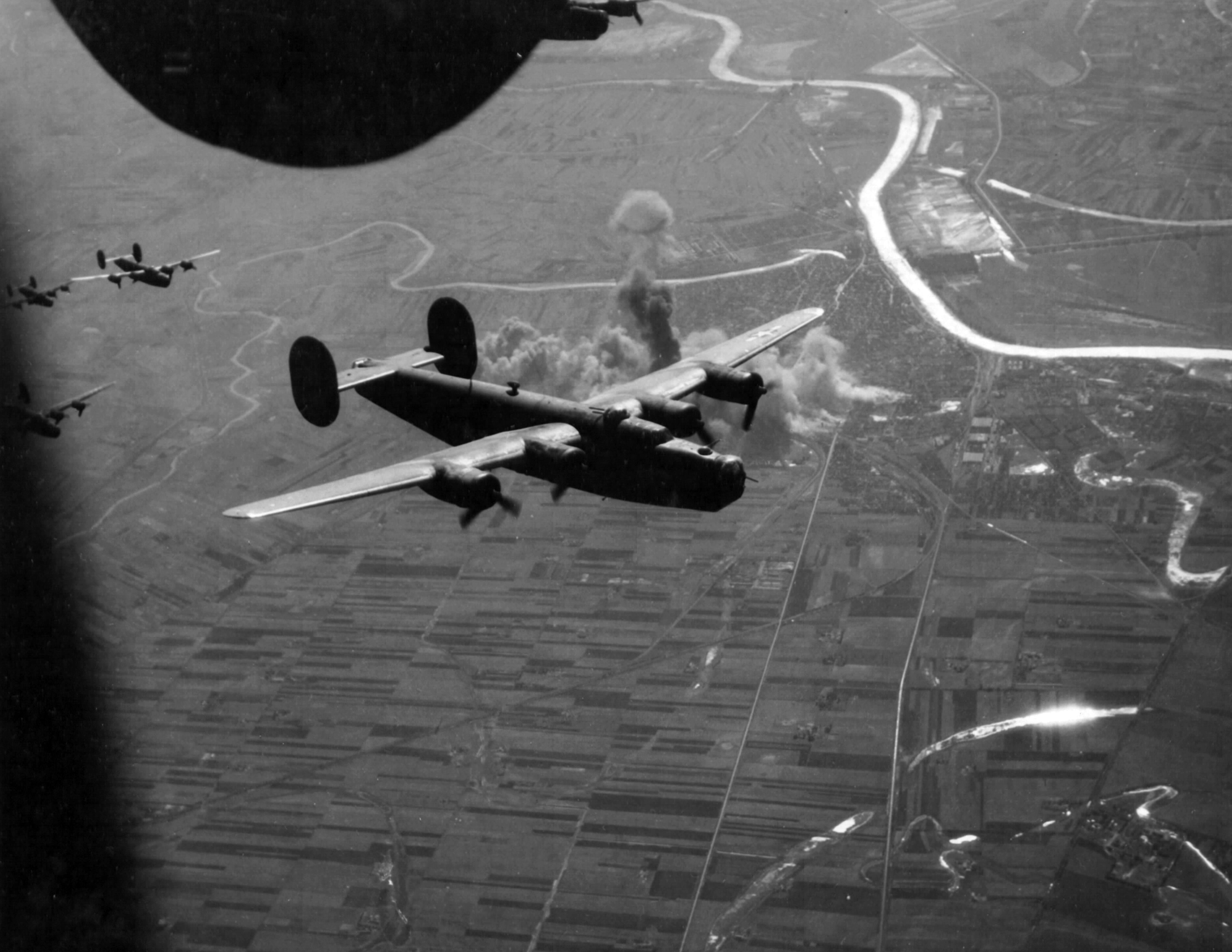 a vasúti pályaudvar bombázása 1944-ben. Location: Hungary, Szolnok Tags: flying, siege, bombing, aerial photo, airplane, second World War, Consolidated-brand, american brand, train station, train station Title: a vasúti pályaudvar bombázása 1944-ben.